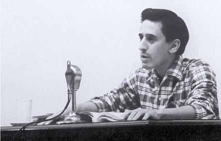 Roque Dalton en la entrega del Premio de Poesía de la Casa de las Américas en 1969, por su libro Taberna y otros lugares.